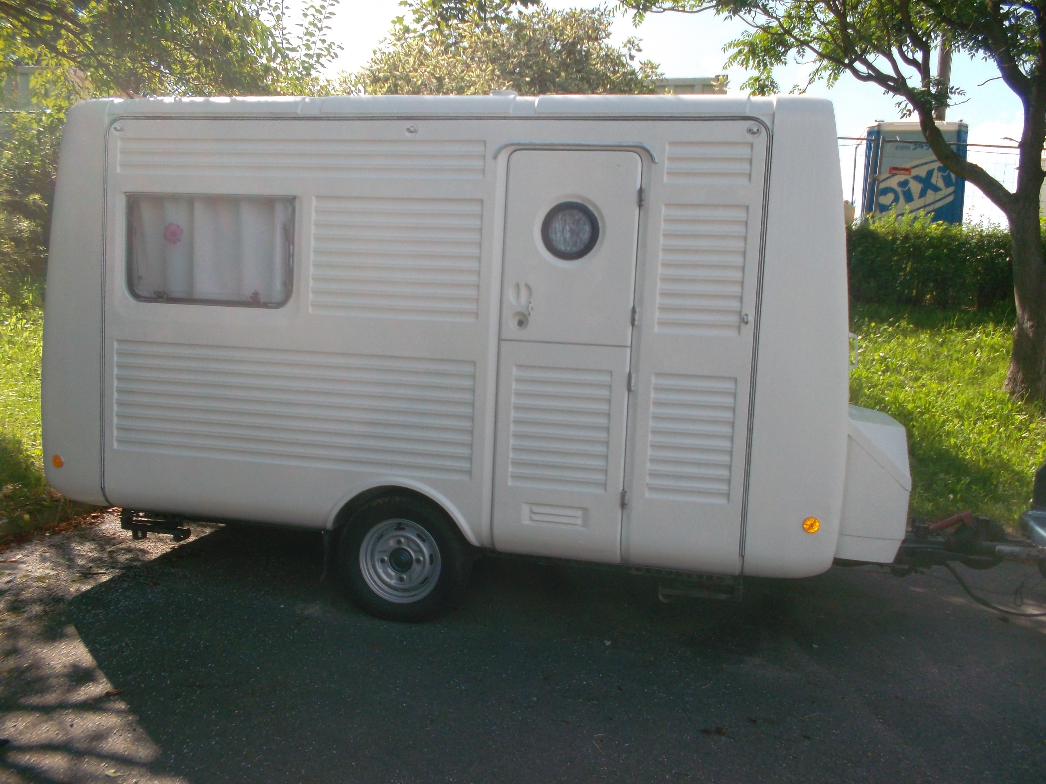 Seitenansicht eines weißen Caravans vom Typ Intercamp 335 L mit Blick auf die 2teilige Eingangstür